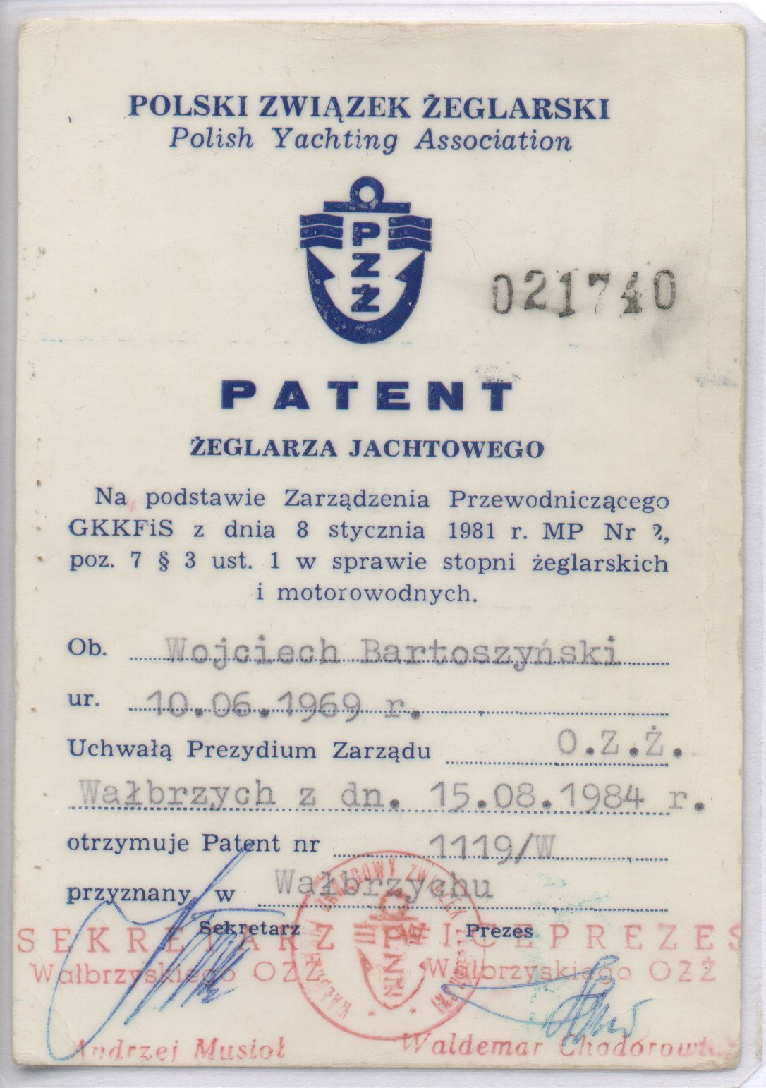 Patent zeglarza jachtowego z roku 1984 - awers / Yachtsman patent, Polisch 1984